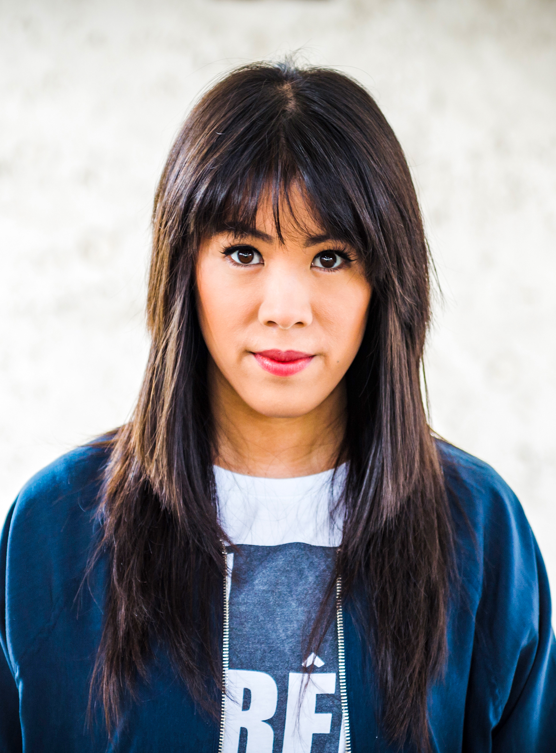 Die Chemikerin, Wissenschaftsjournalistin, Fernsehmoderatorin, Autorin und Youtuberin Mai Thi Nguyen-Kim